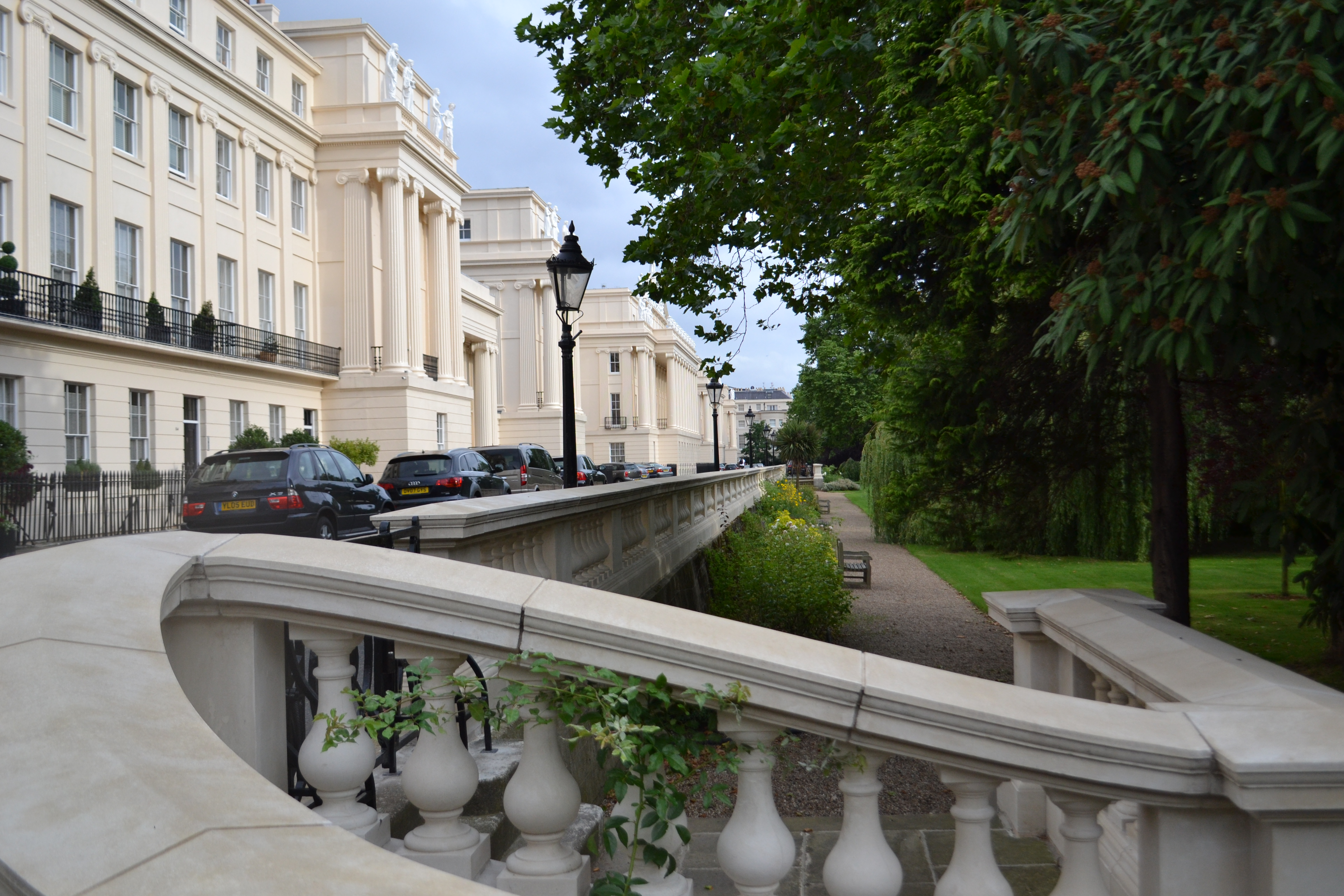 Vue des Cumberland Terraces à Londres, oeuvre de l'architecte anglais John Nash (1752 / 1835)